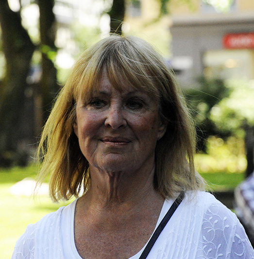 Anita Strandell at the funeral of Magnus Härenstam at Hedvig Eleonora Church, Stockholm.